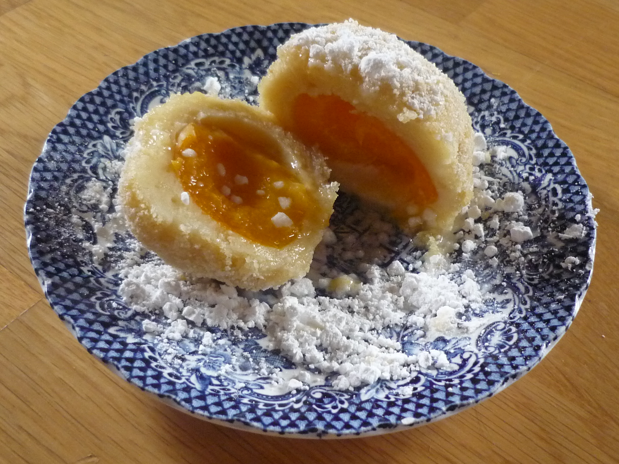 Ein Marillenknödl.